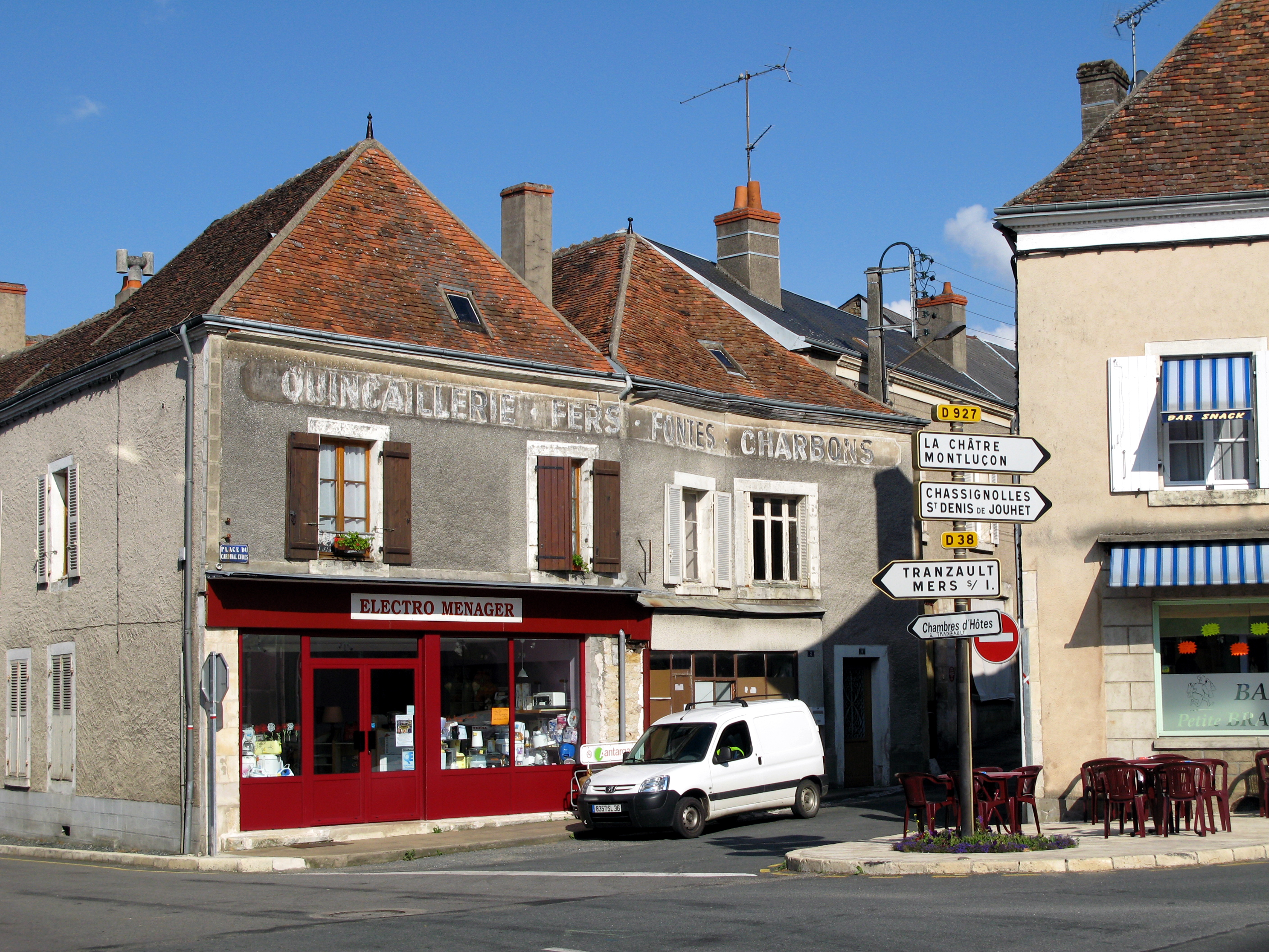 Neuvy-Saint-Sépulchre (Indre, France) - La place du Cardinal Eudes. Traces subsistant sur une façade d'une ancienne activité commerciale. . .